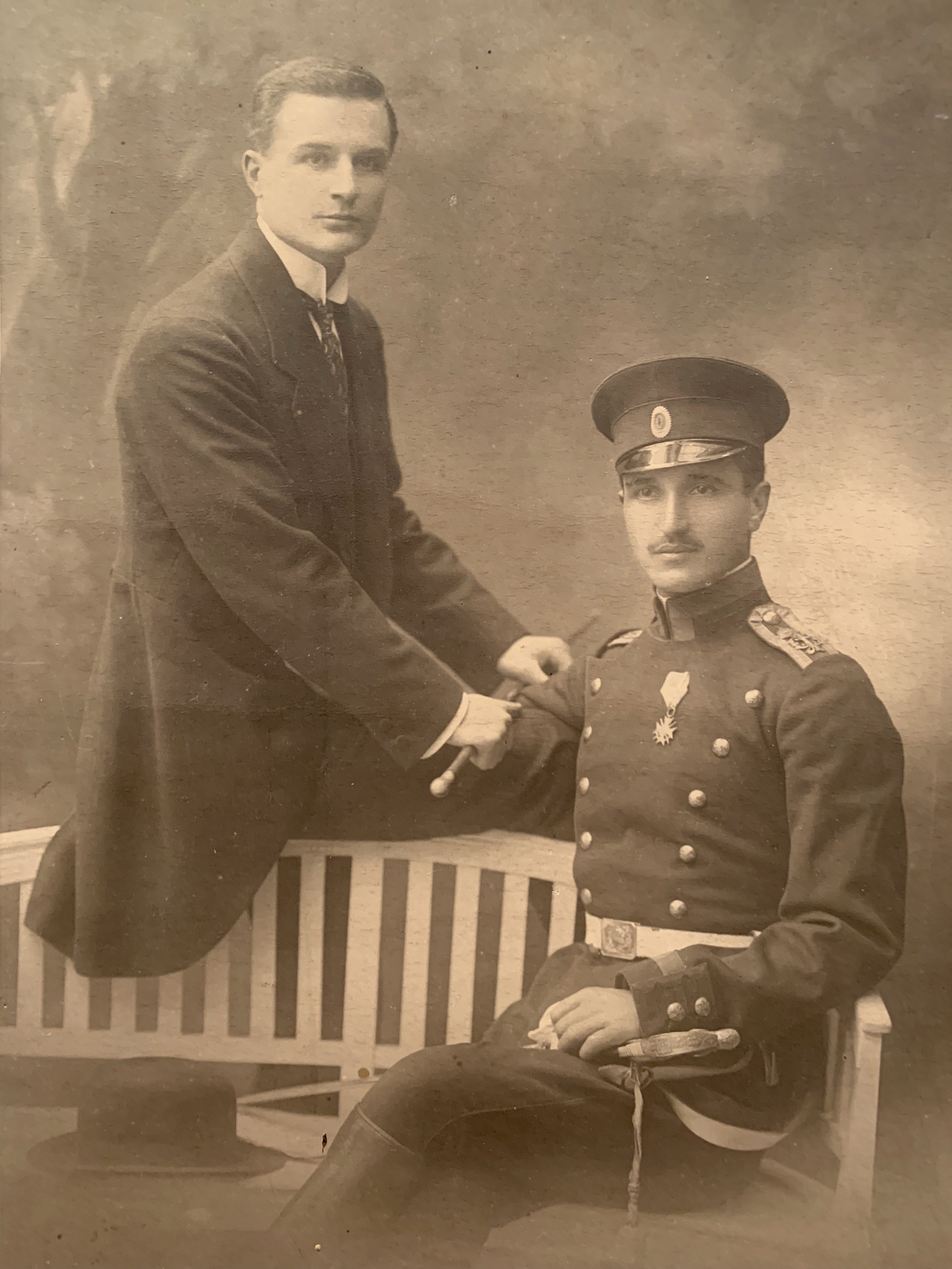 Братя Йордан и Панче Гюркови. 9 Март 1915г.